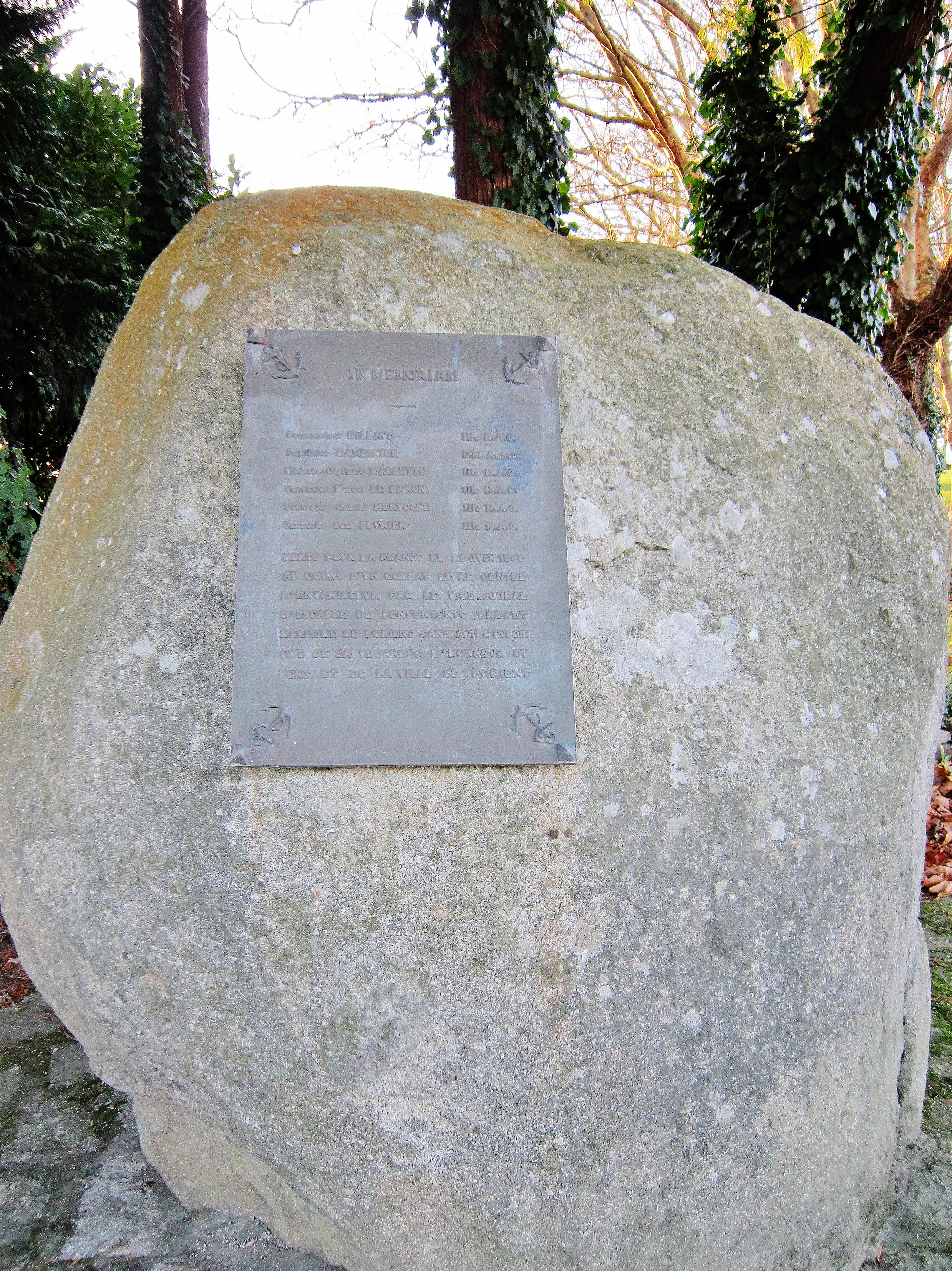 Guidel : monument commémoratif à la mémoire de soldats tués lors de combats le 21 juin 1940 (situé aux Cinq Chemins en Guidel).